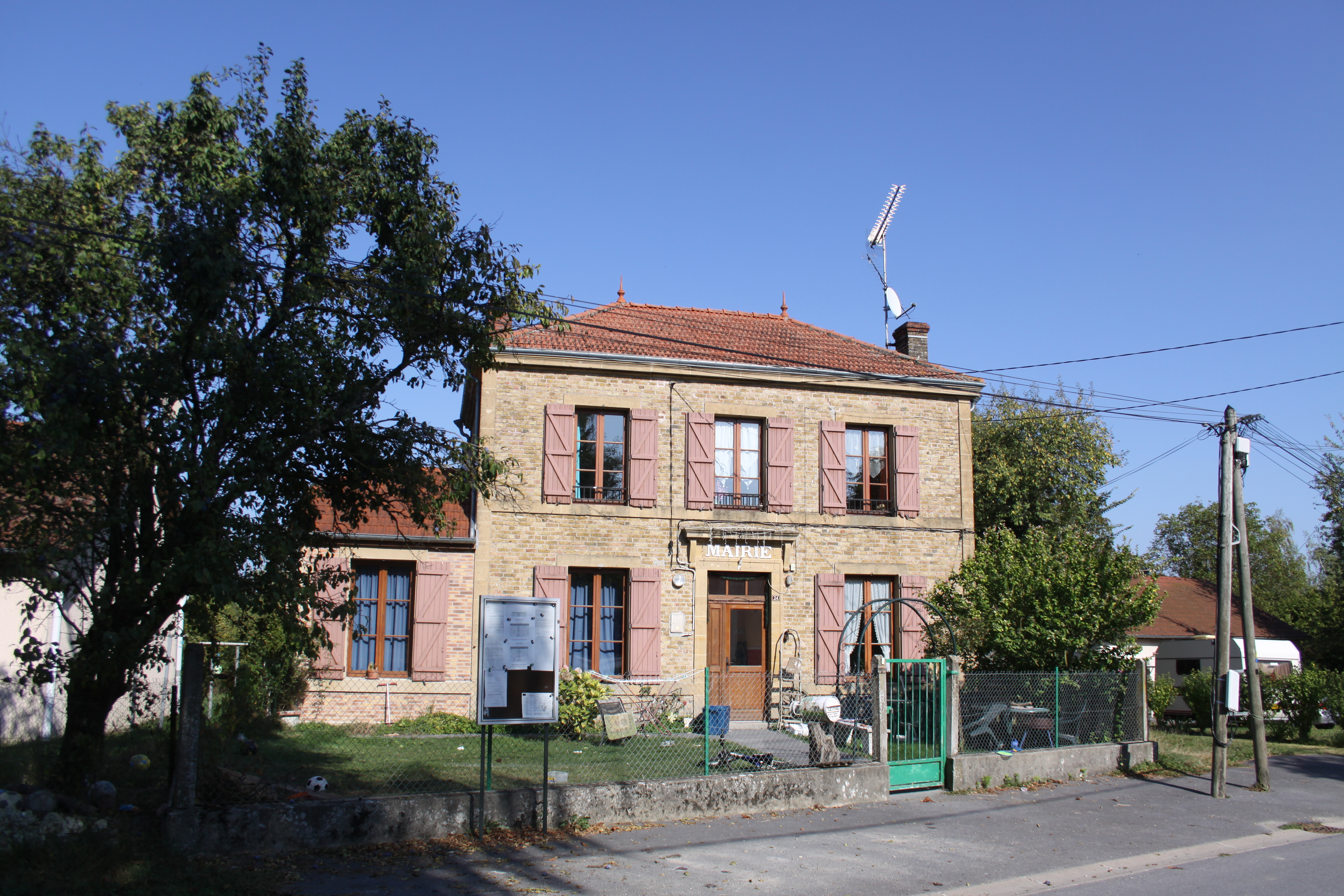 Village Ardennais